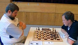 Thorsten-Michael Haub und Laszlo Juhasz, 2001 bei der Stuttgarter Stadtmeisterschaft im Schach, letzte Runde und alles entscheidende Partie.